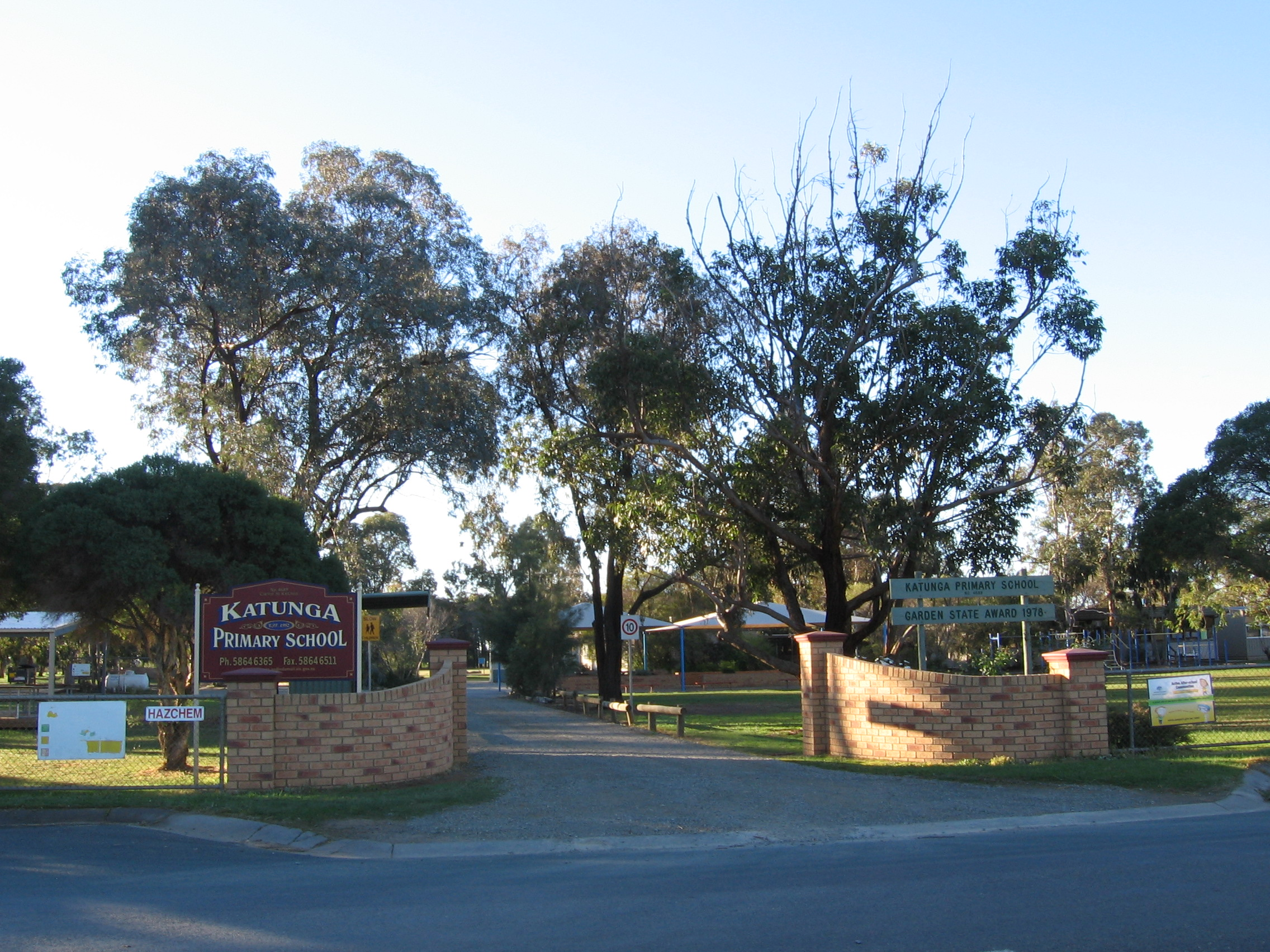 Katunga Primary School at Katunga, Victoria